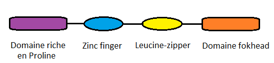 structure de la protéine FoxP3